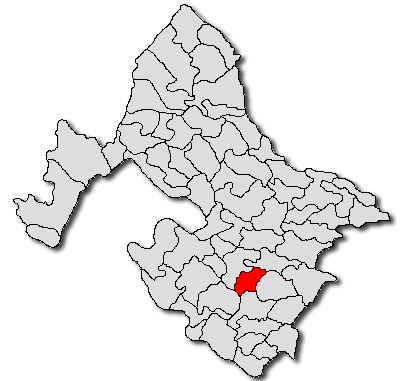 Categorie:Hărţi ale judeţului Mehedinţi